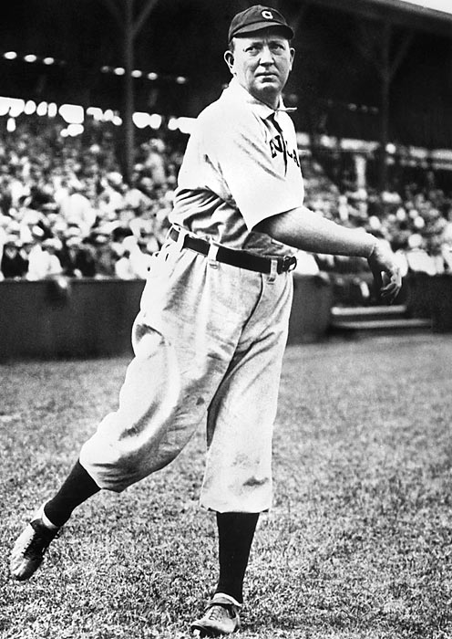 Cy Young.